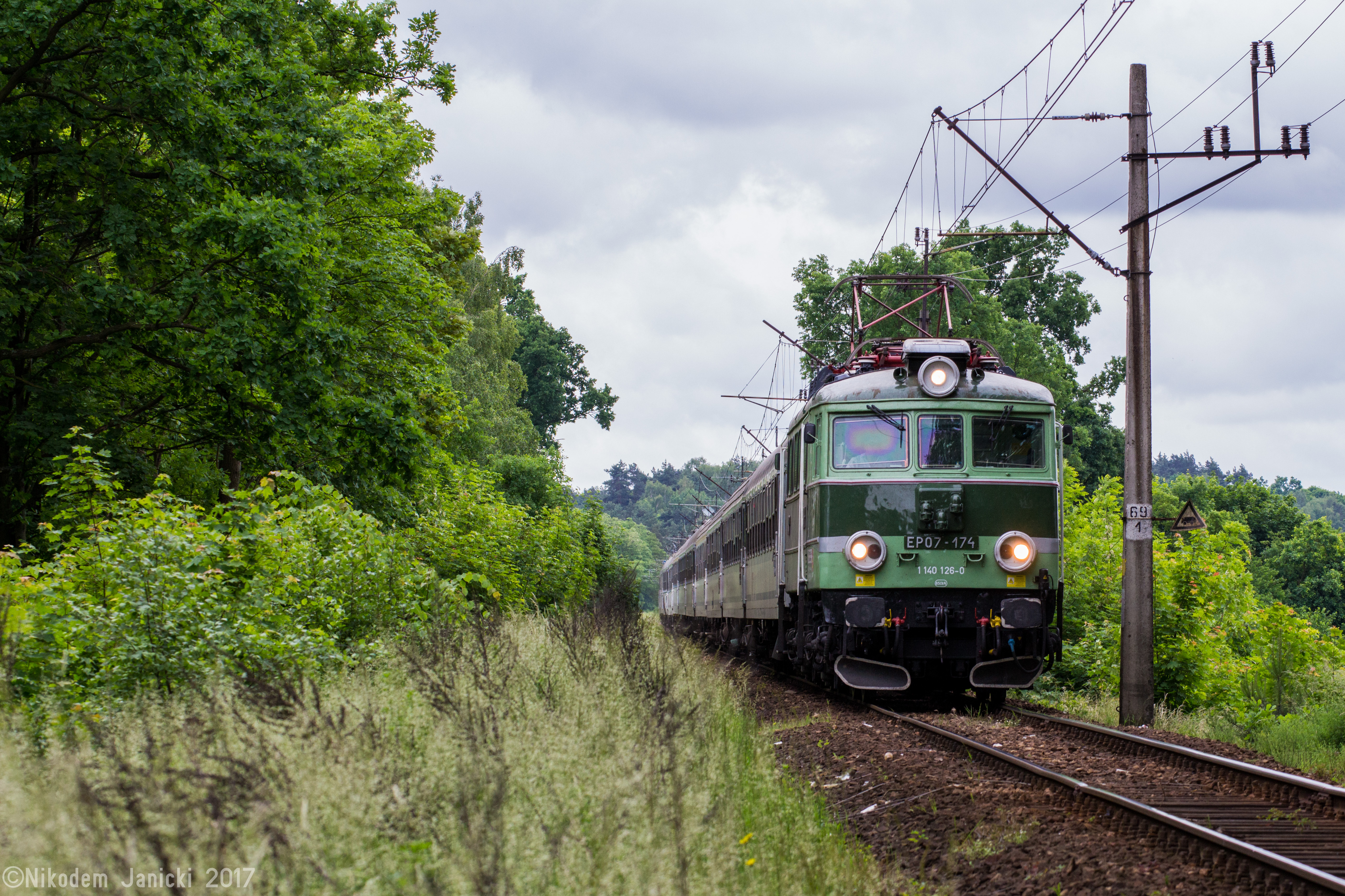 EP07-174 w klasycznym malowaniu, które otrzymała po P4 w ZNTKiM Gdańsk, zbliża się do stacji Chodzież z pociągiem TLK Gwarek